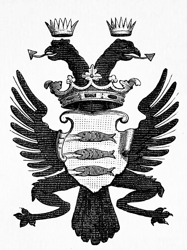 Graf- en gedenkschriften van de provincie Antwerpen